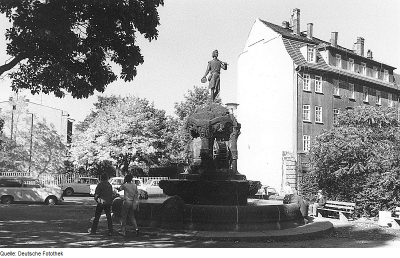 Original image description from the Deutsche Fotothek Dresden-Plauen. MüllerbrunnenMüllerbrunnen in Dresden-Plauen; Figur des Müllerburschen vom Dresdner Bildhauer Robert Henze.